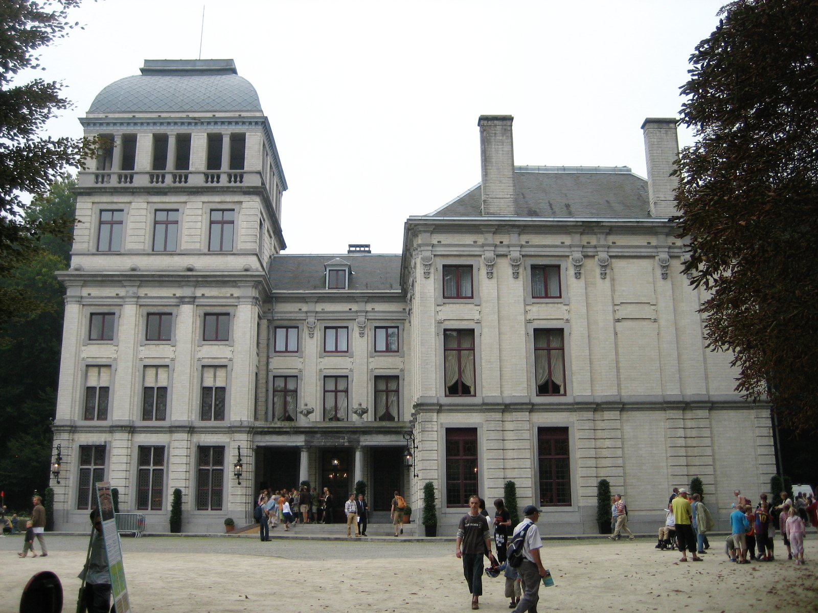 Sujet: D'Schlass vu Val Duchesse, zu Auderghem, am September 2006 bei enger Porte-ouverte. Auteur: user:Zinneke